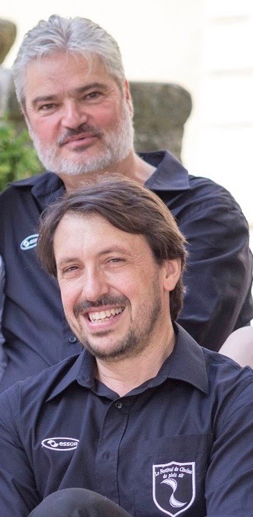 les deux protagonistes du festival